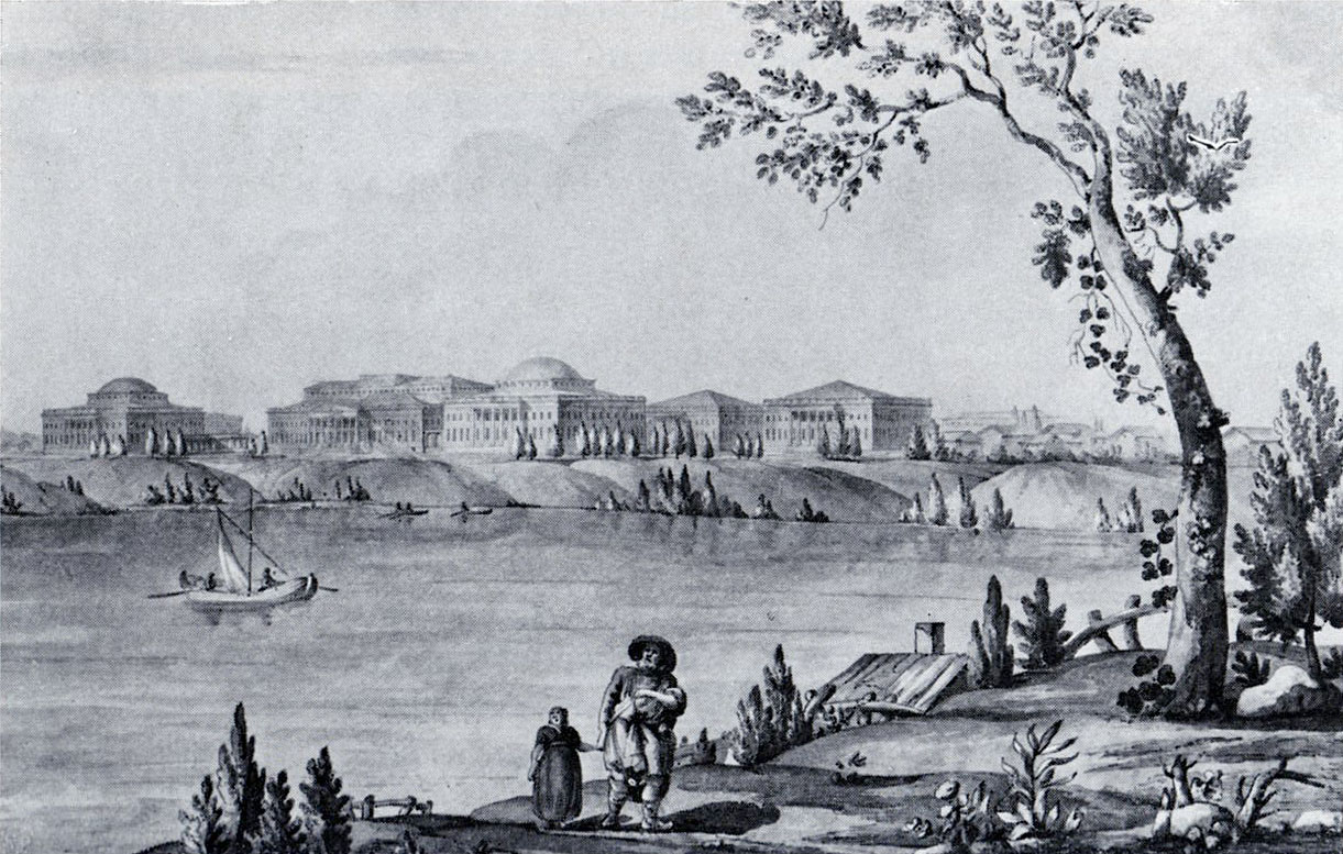 Дворец в Пелле. Рисунок Джакомо Кваренги (акварель?). Начало XIX века.